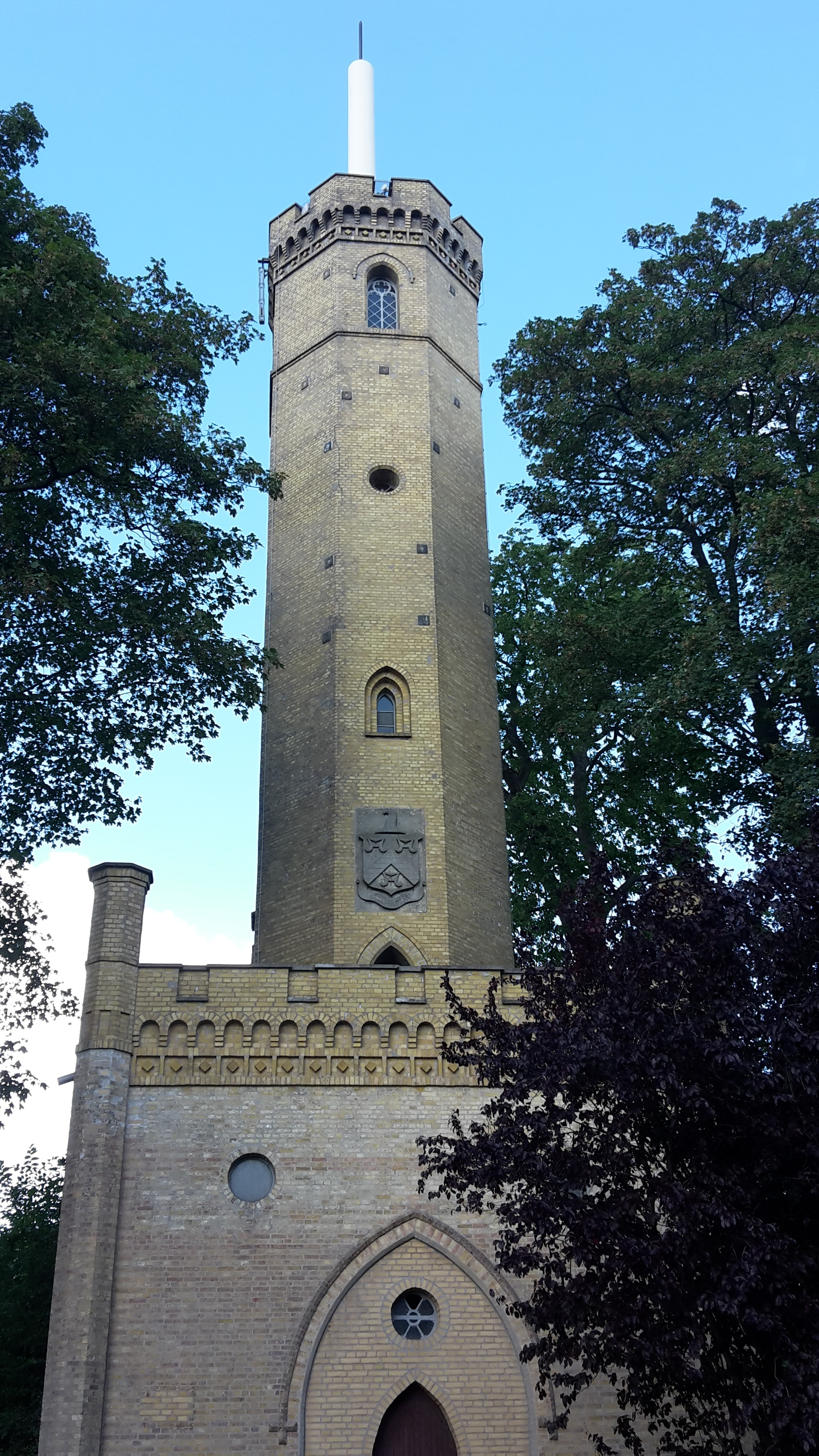 Der Luisenberger Turm ist ein denkmalgeschützter Aussichtsturm in Kellinghusen in Schleswig-Holstein.